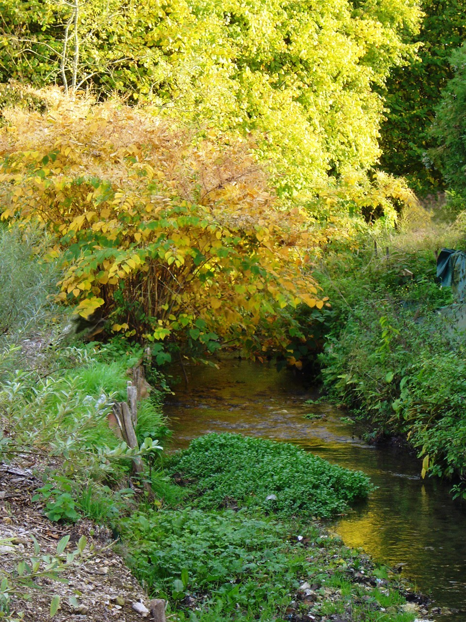 Ruisseau du Mesland à Limeray Indre-et-Loire Touraine France